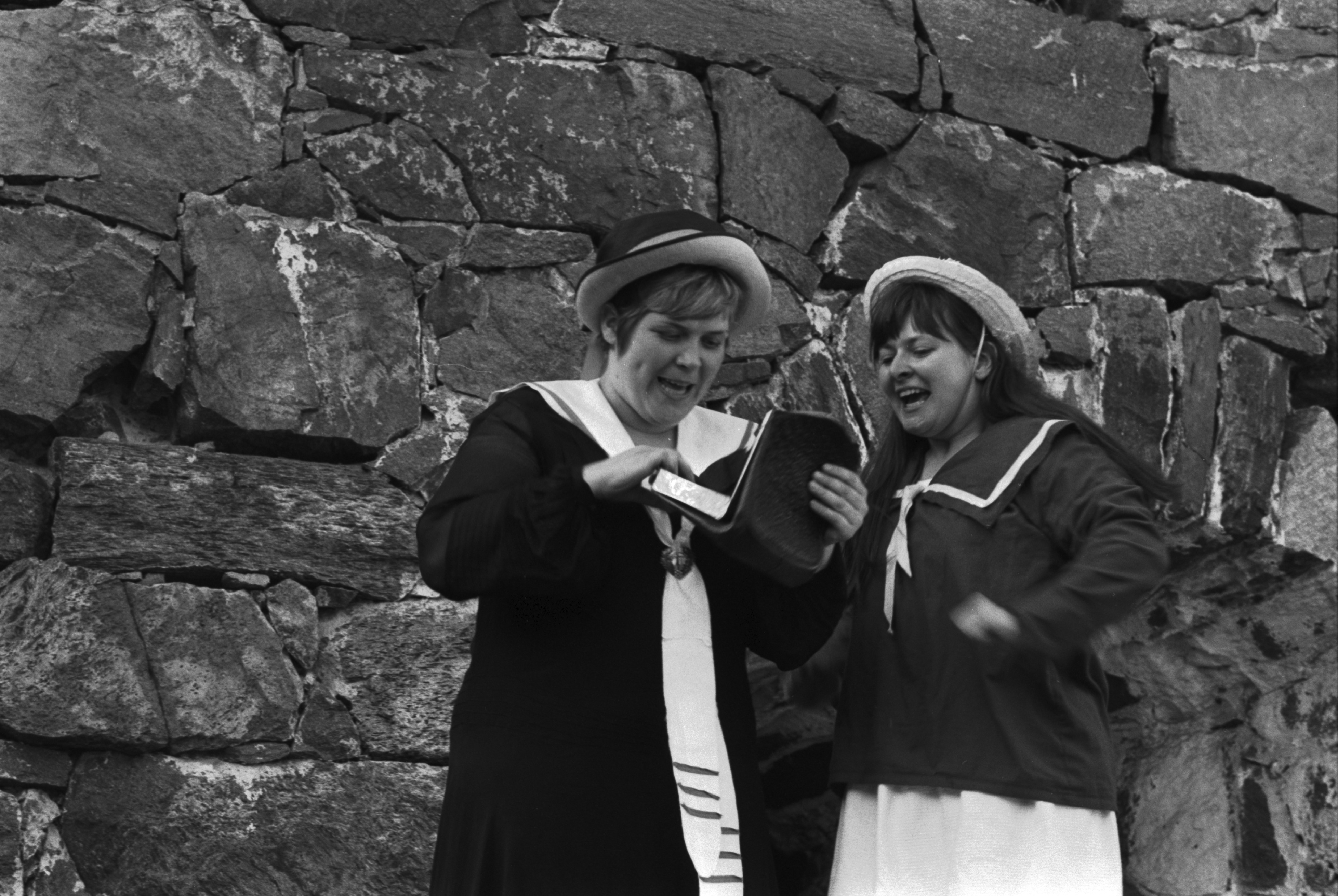 Helsinki, Susisaari B47. KOM-teatterin Suomen kuningas -näytelmä Suomenlinnan kesäteatterissa raveliini Hyvässä Omantunnossa. Kuvassa näyttelijät Kaisa Korhonen ja Eriikka Magnusson.